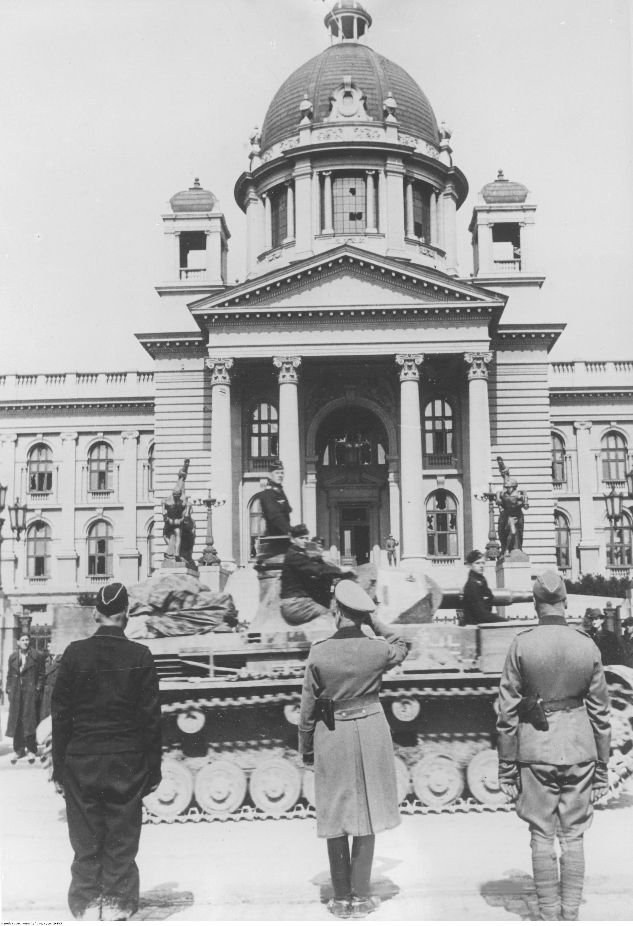 Defilada wojsk niemieckich w Belgradzie przyjmowana przez gen. Ewalda von Kleista (w środku). Przed nim przejeżdża czołg typu PzKpfw IV z 11. dywizji pancernej. W tle widoczny budynek parlamentu.